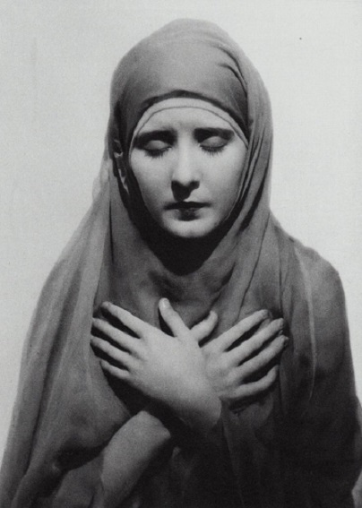 Patricia Avery